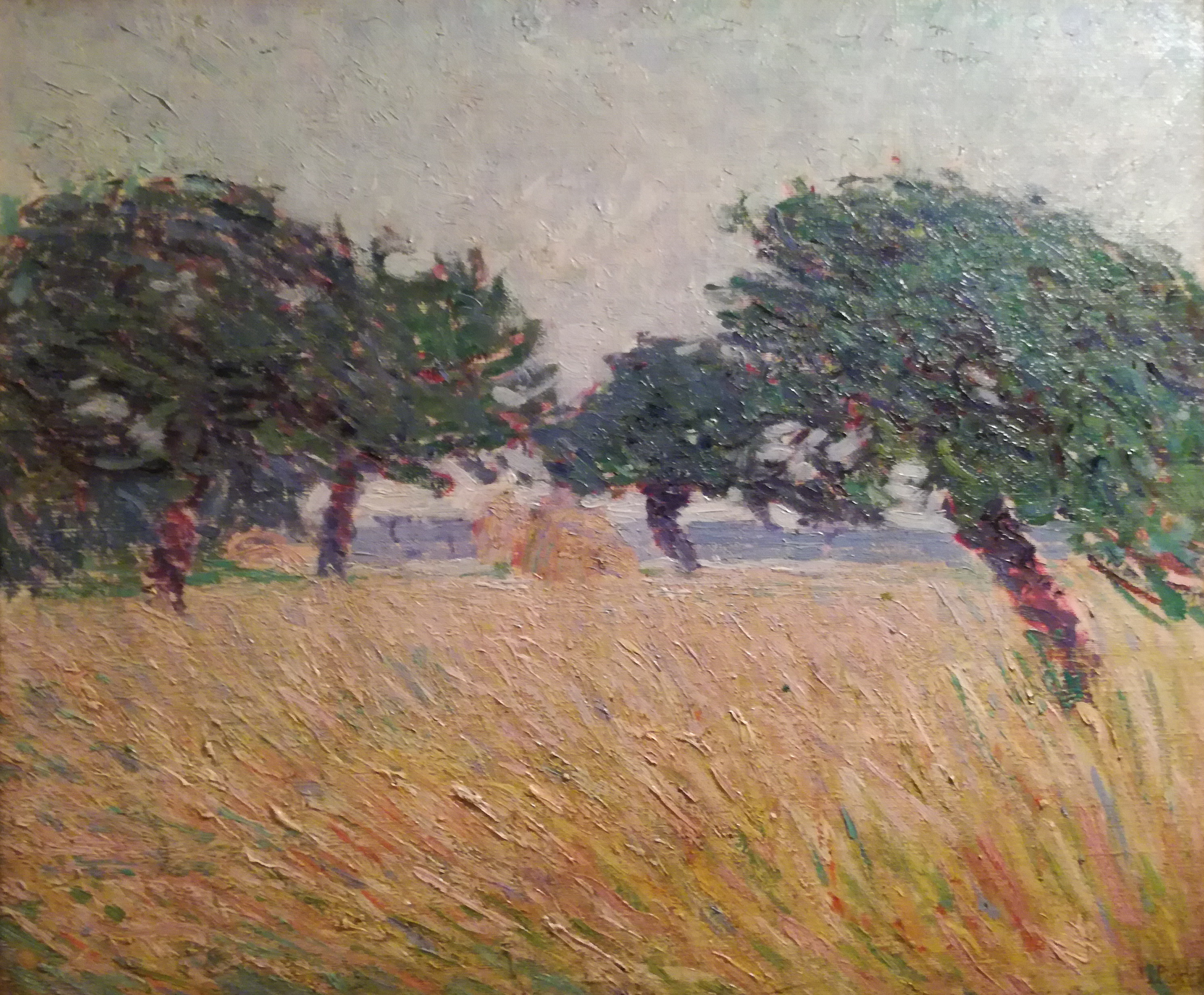 Opera del periodo prefuturista